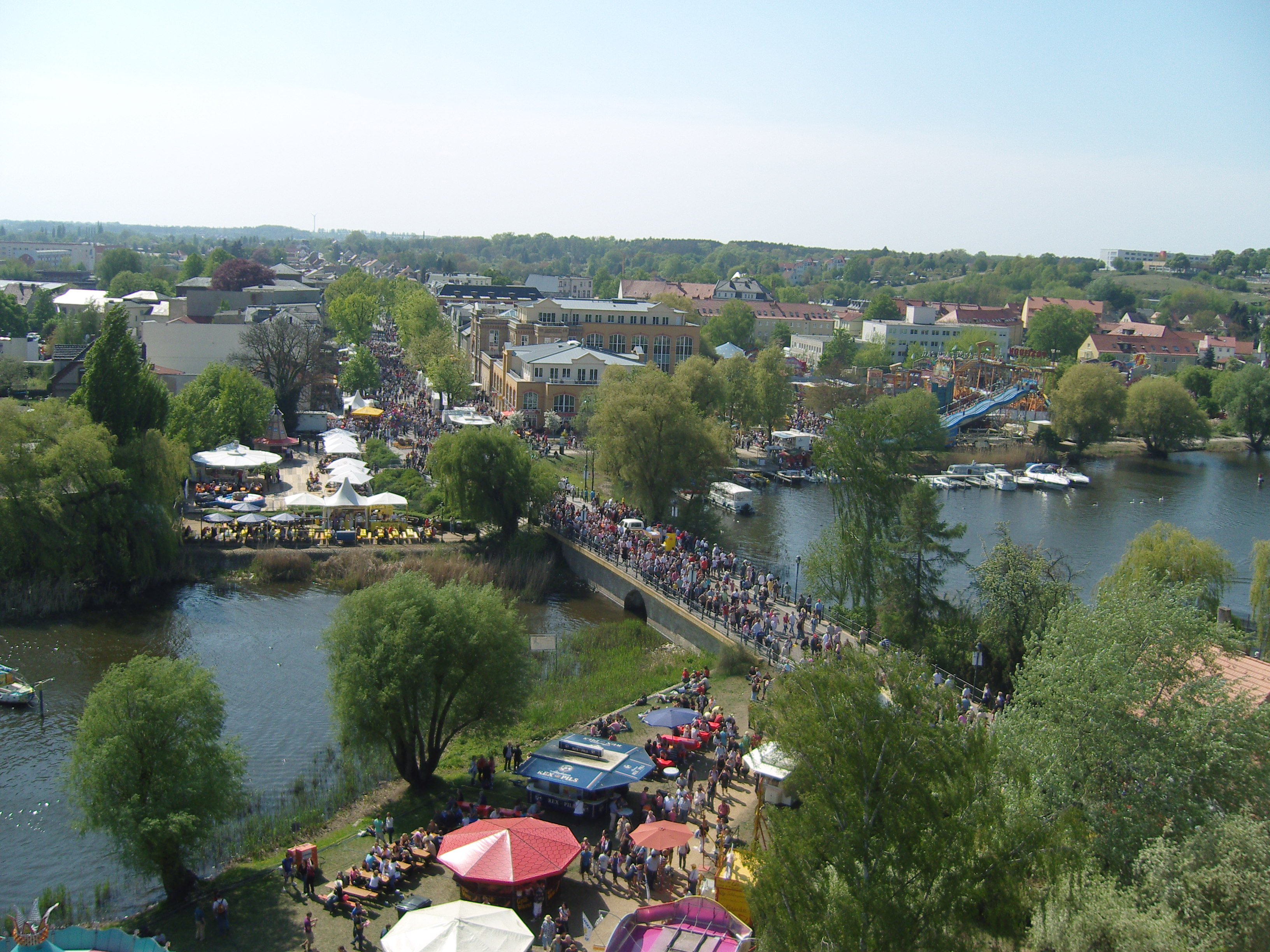 Blick aus dem Riesenrad über das Baumblütenfest 2009 in Werder/Havel